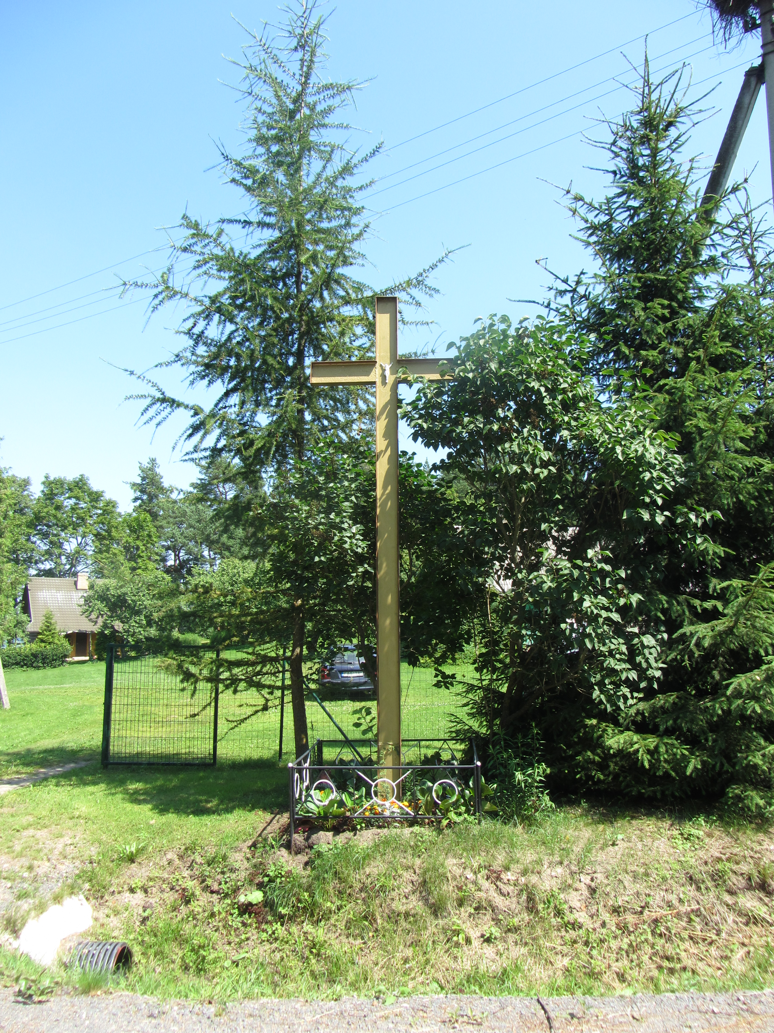 Rimšės sen., Lithuania